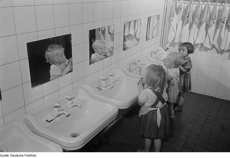 Original image description from the Deutsche FotothekDrei Kleinkinder an Waschbecken eines Kinderkrippenbaderaums beim Zähneputzen